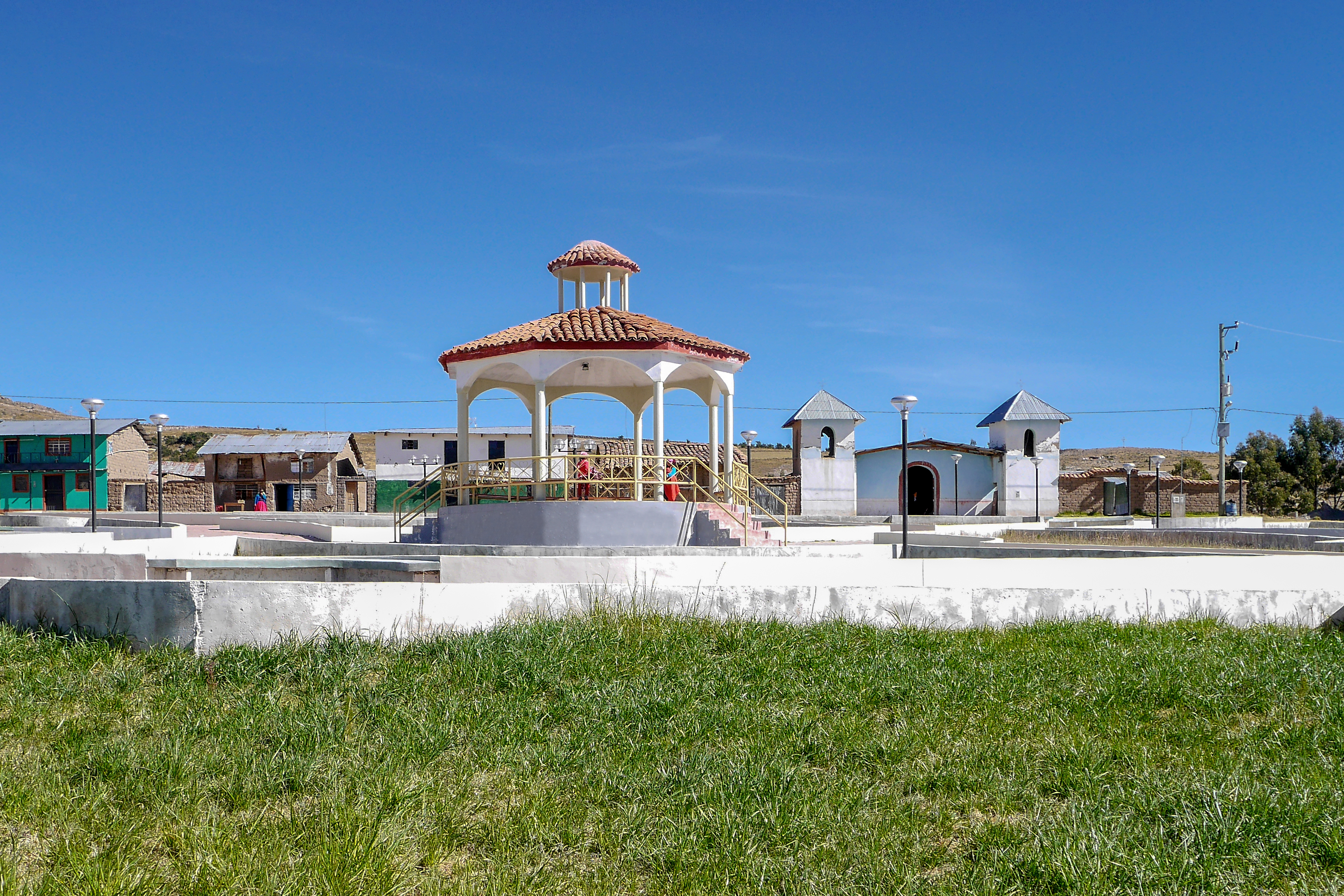 Cochani